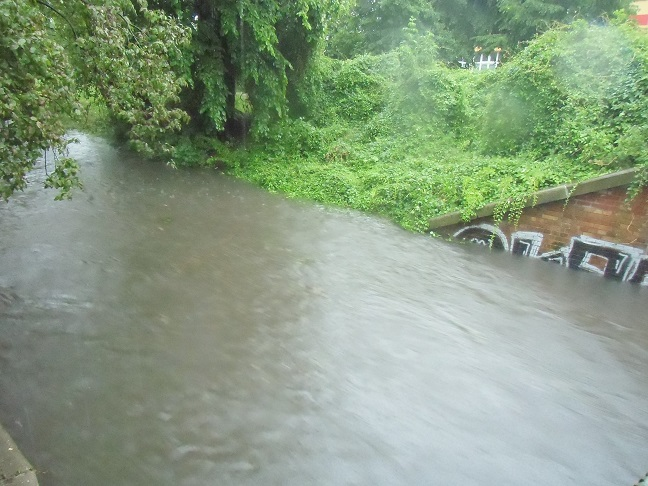 Panke Hochwasser am 29.06.2017, Blick von der Walter-Röber-Brücke, Berlin-Gesundbrunnen